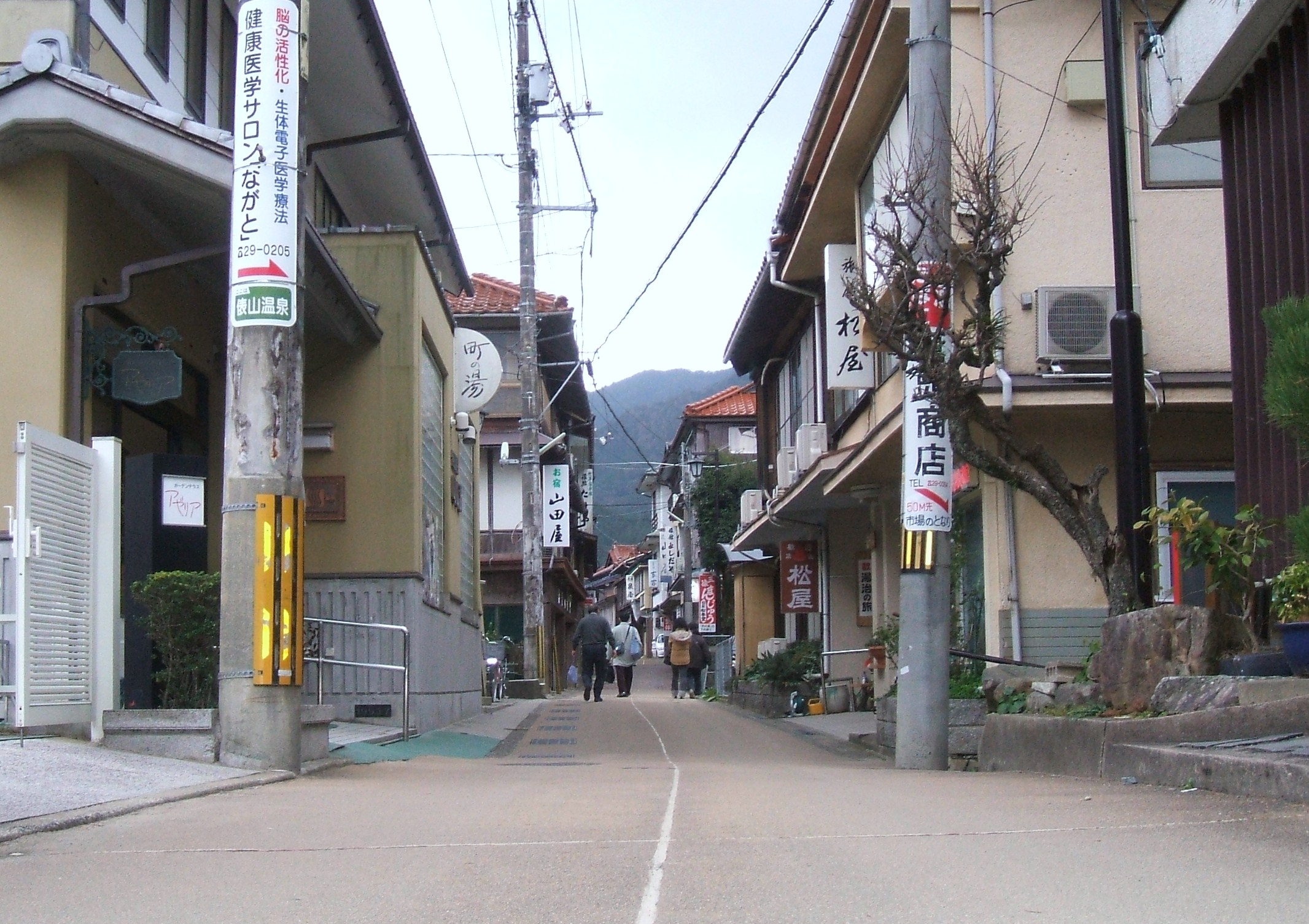 Tawarayama-Spa@Nagato,Yamaguchi,Japan (俵山温泉 - 山口県長門市)